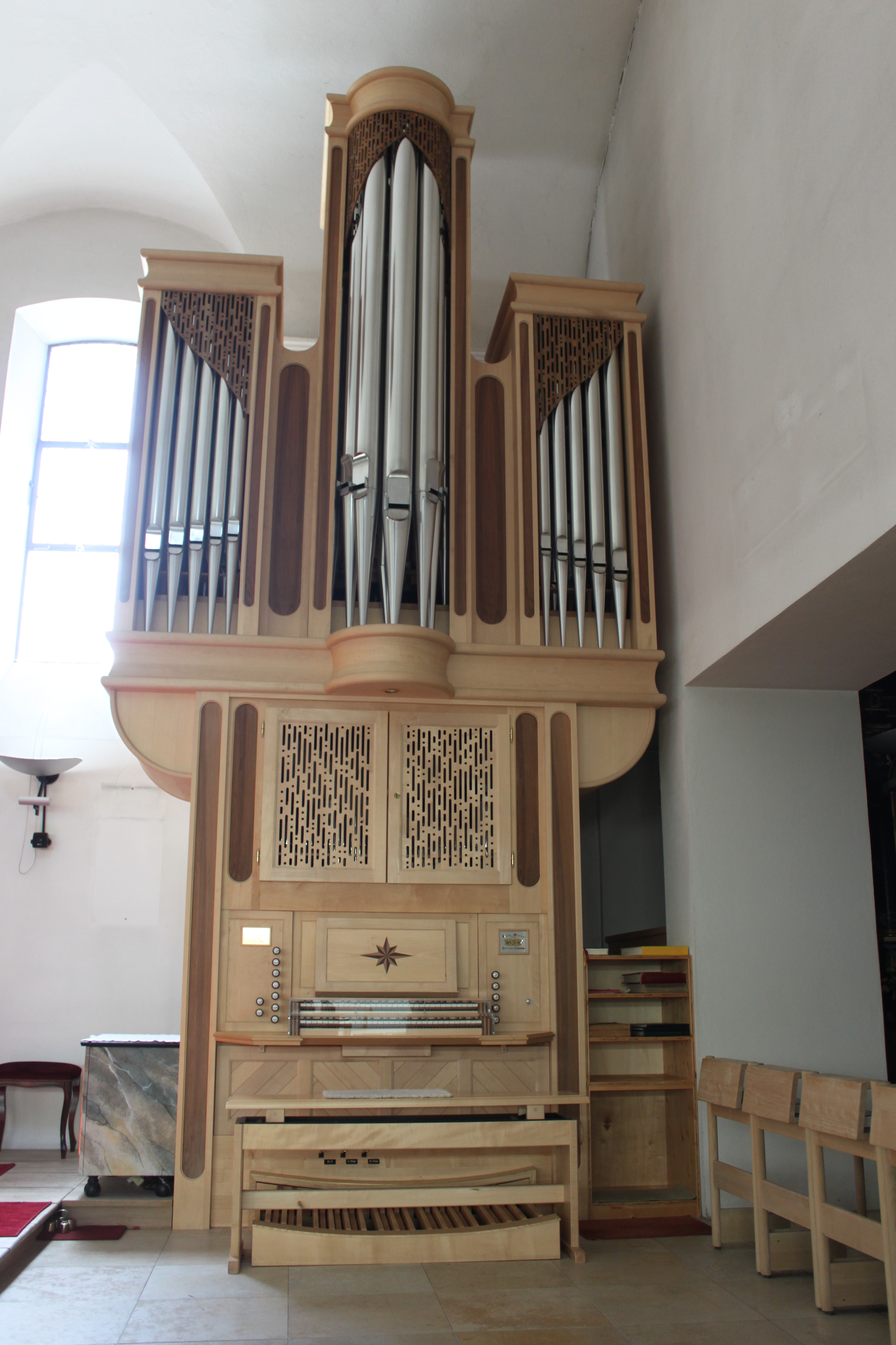 Kath. Pfarrkirche hl. Antonius Eremit mit Friedhof